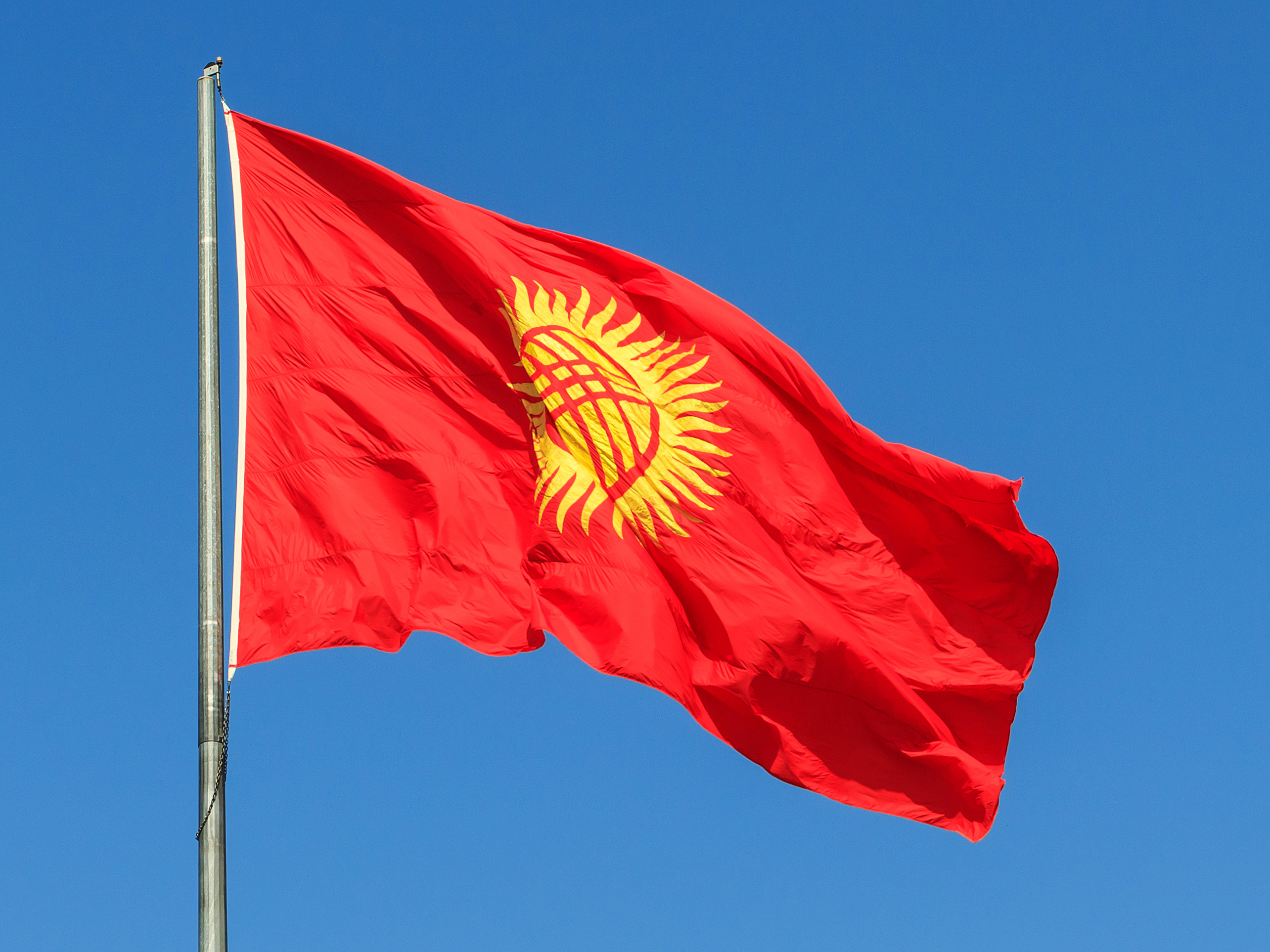 Flaga Kirgistanu